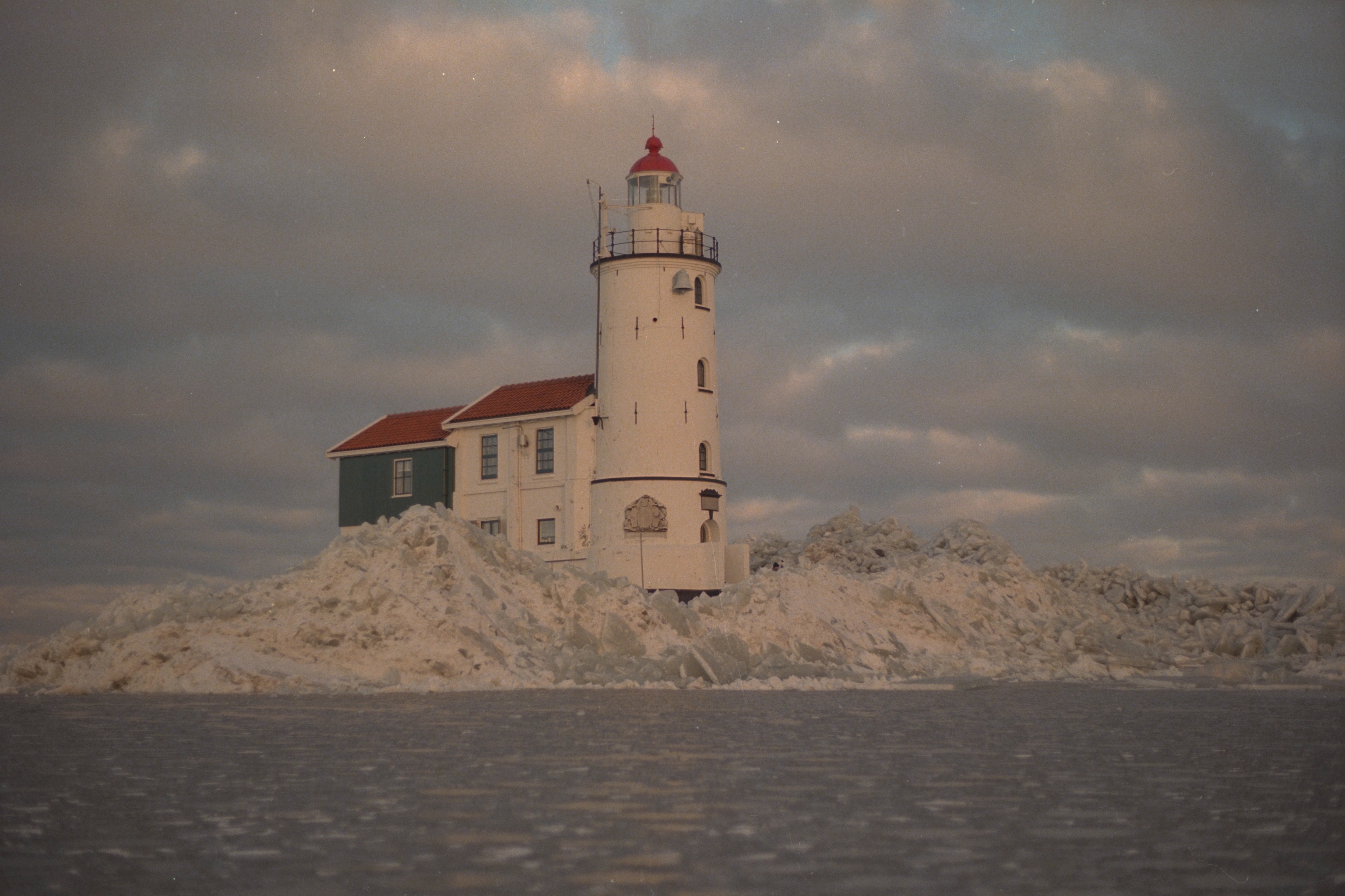 Vuurtoren van Marken omringd door kruiend ijs.